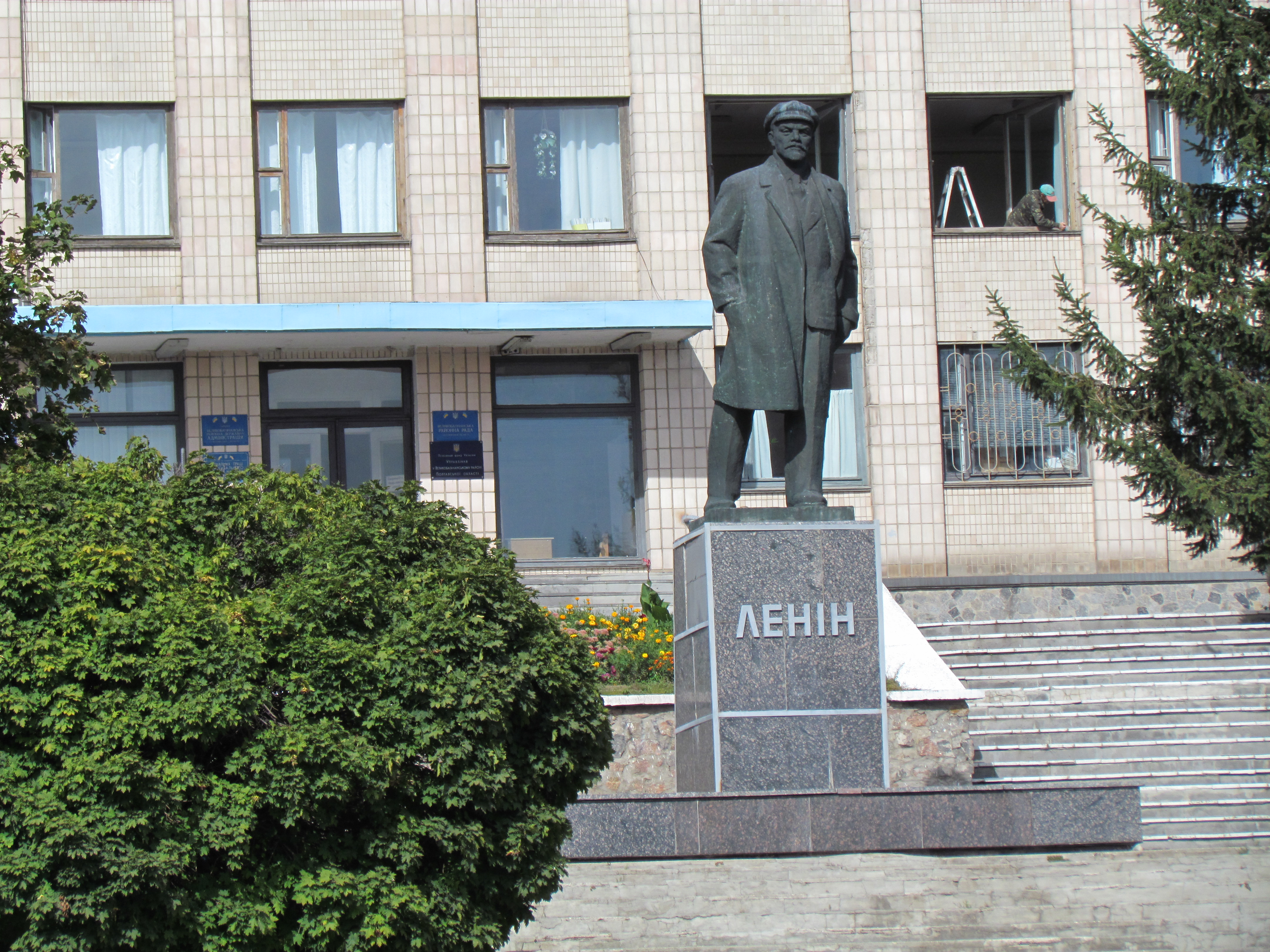 смт. Велика Багачка. Пам'ятник В.І.Леніну